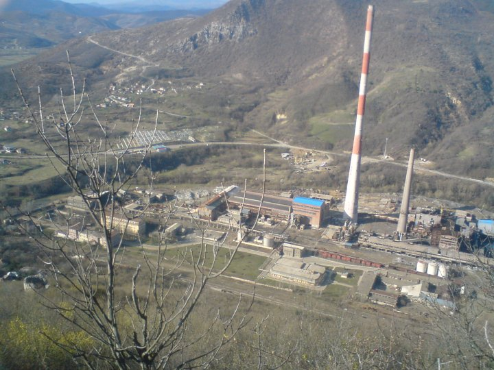 Pogled na rudnik Trepča sa tvrđave Zvečan. Slikano 30. marta 2010.